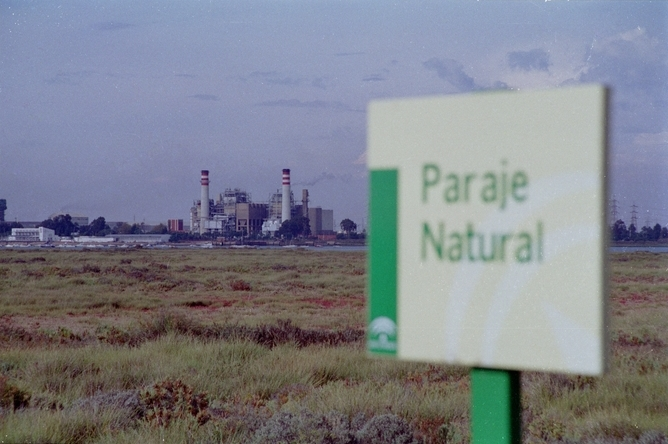 Paisaje natural e industrial en la provincia de Huelva